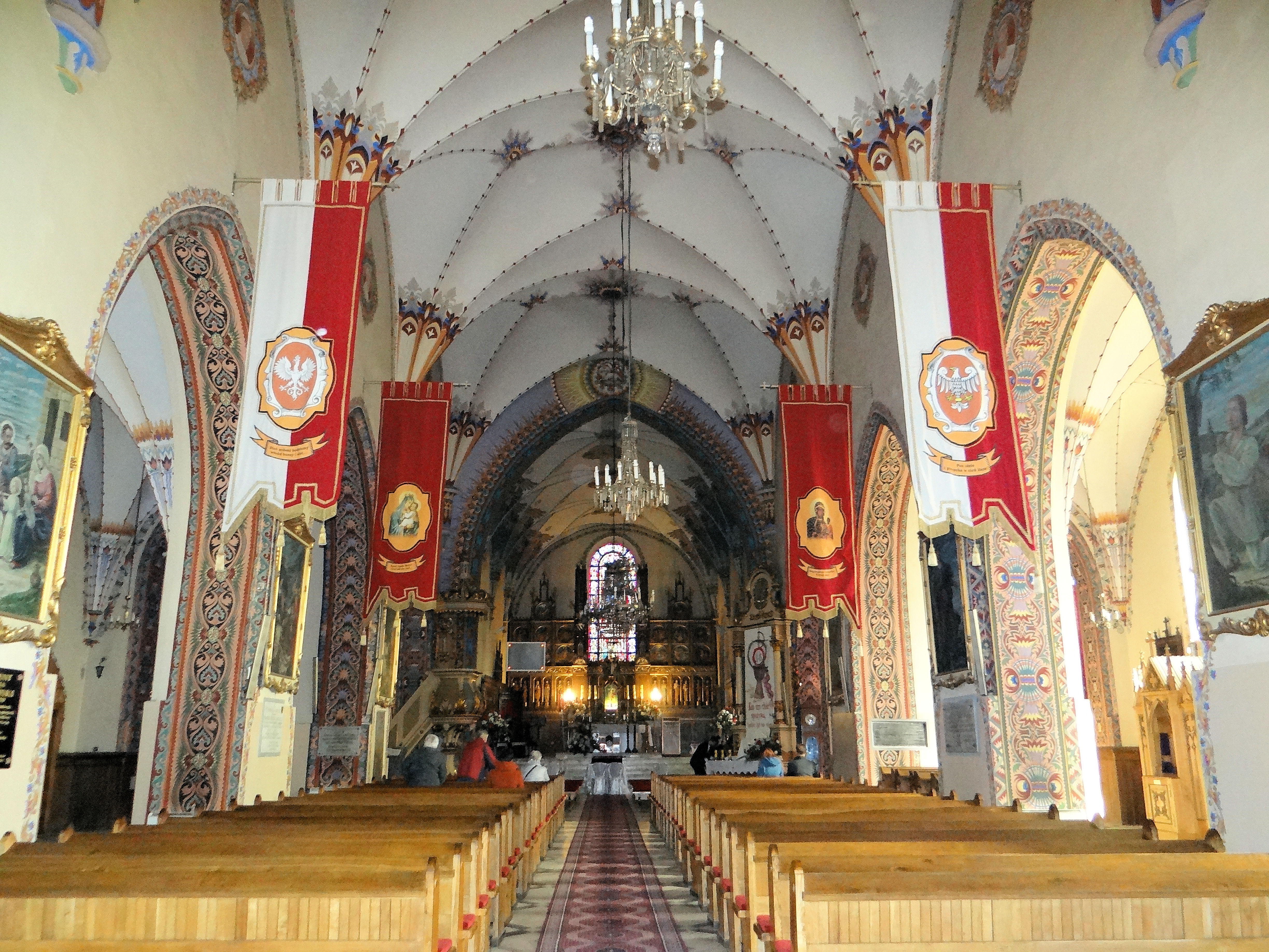 Ciechanów, zespół kościoła par. pw. Narodzenia NMP